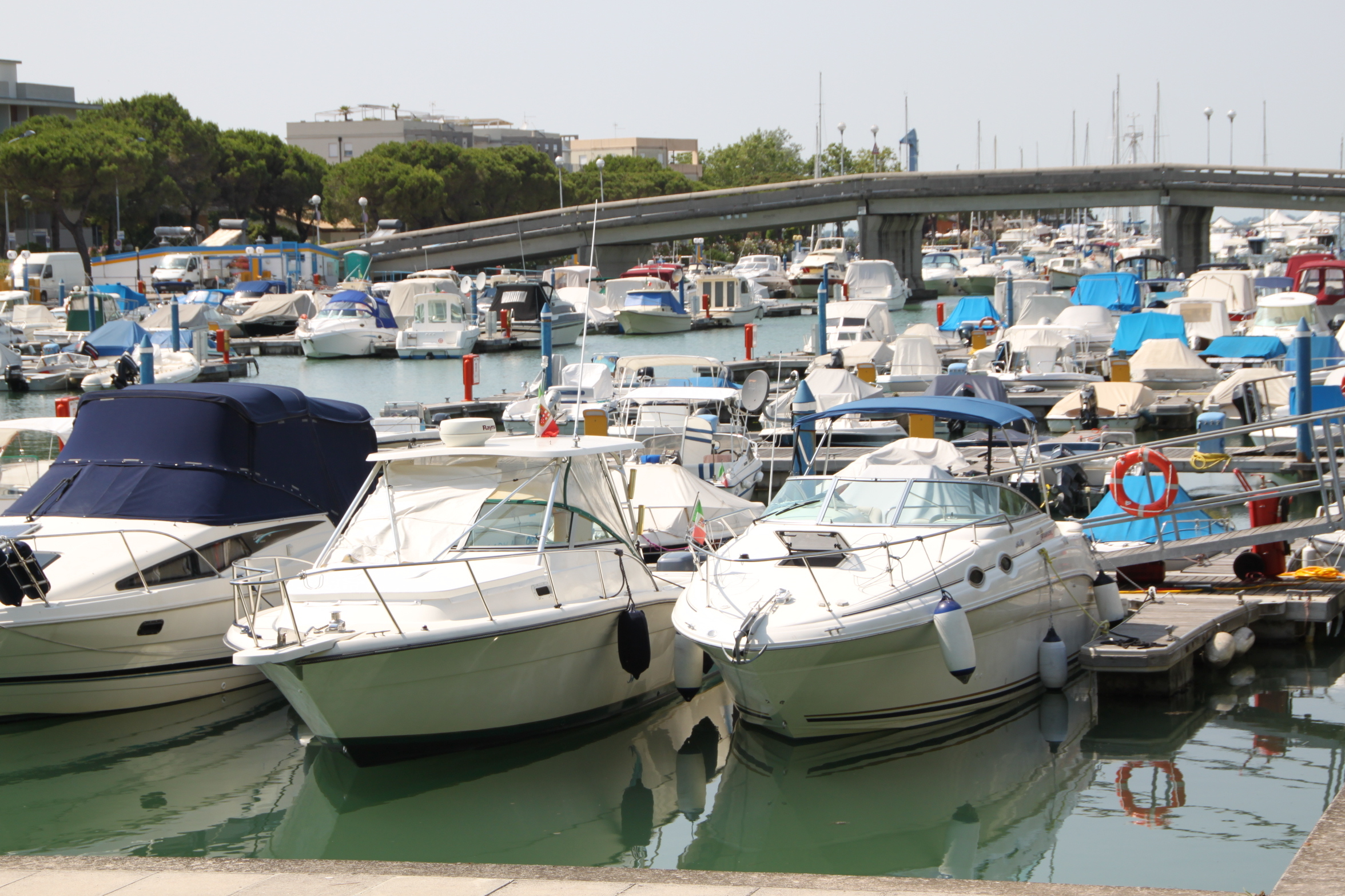 33054 Lignano Sabbiadoro, Province of Udine, Italy